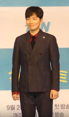 16일 오전 서울시 마포구 도화동 베스트웨스턴프리미어 서울가든호텔에서 tvN 새 금요드라마 '쌉니다 천리마마트' 제작발표회가 열려 배우 가 참석해 포토타임을 갖고 있다.